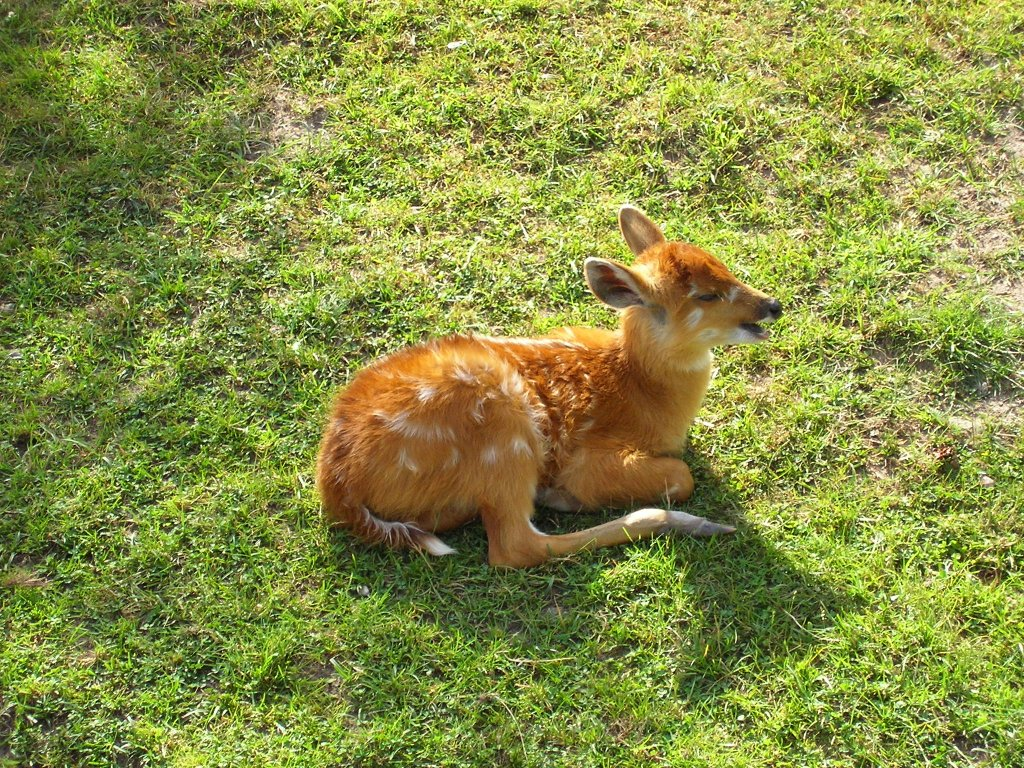 Młody mulak